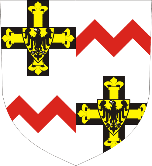 Teutonic Order - Coat of Arms of the Grandmaster Wappen des Hochmeisters des Deutschen Ordens Werner von Orseln